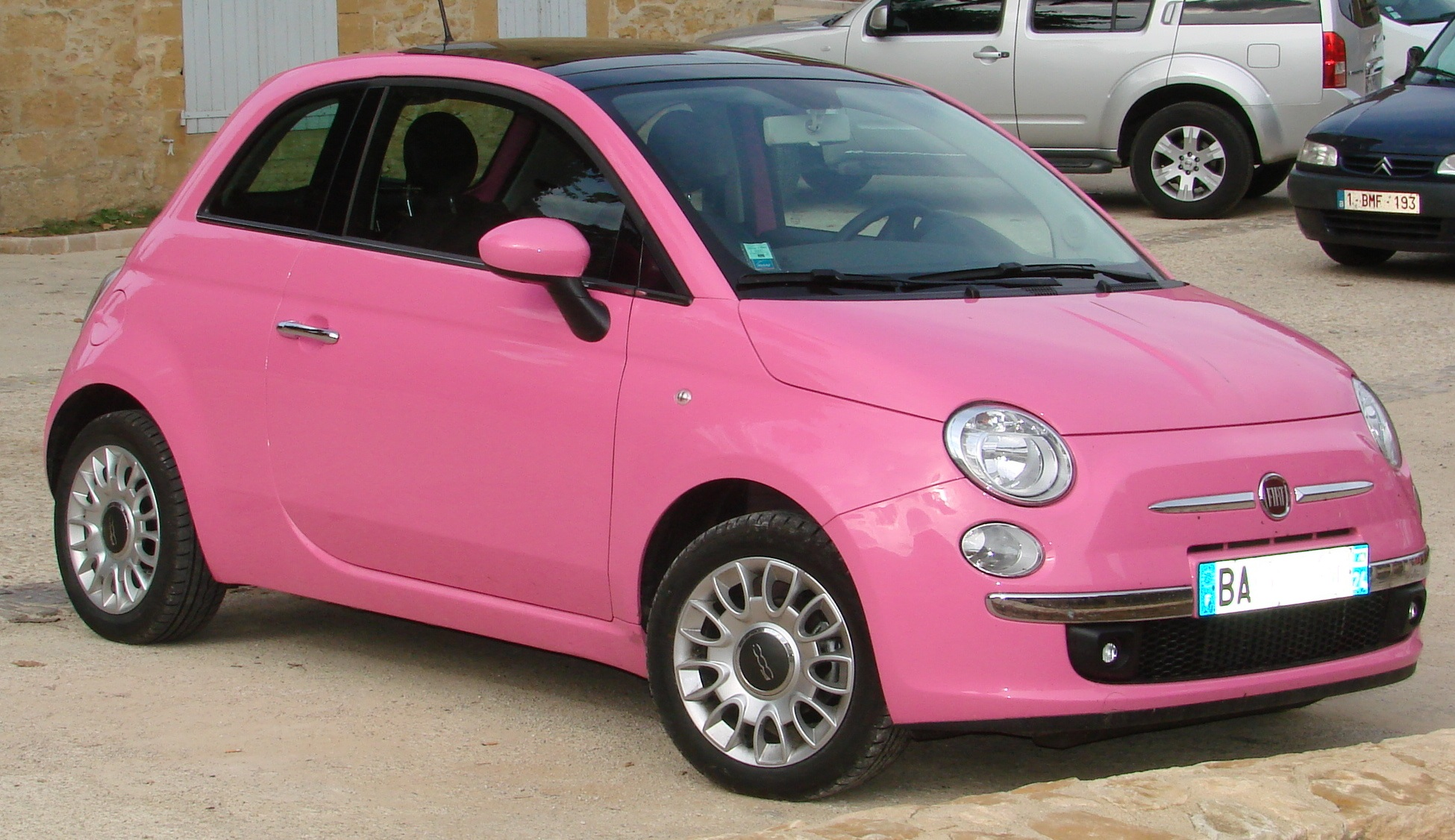 Fiat 500 en Dordogne